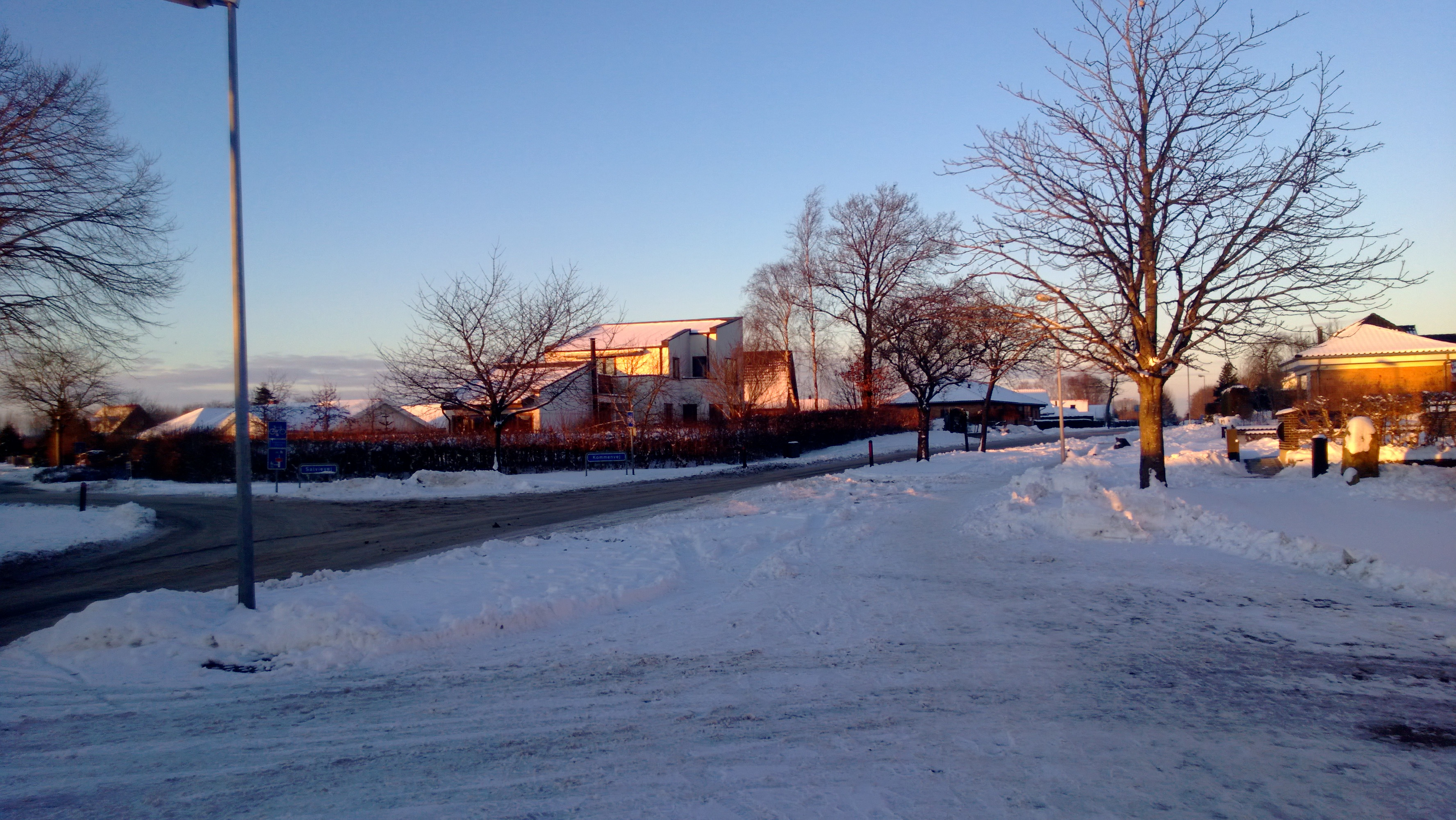 Billede taget i Engelsborg